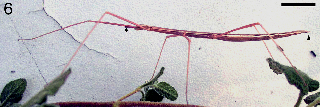 Leptynia annaepaulae female, paratype.